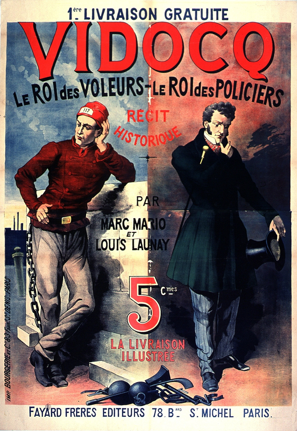 Affiche publicitaire d'A. Bonnard pour le récit historique de Marc Mario [alias de Maurice Jogand) et Louis Launay [alias Louis de Pôville], Vidocq, le roi des voleurs, le roi des policiers, Paris, Fayard, 1892.